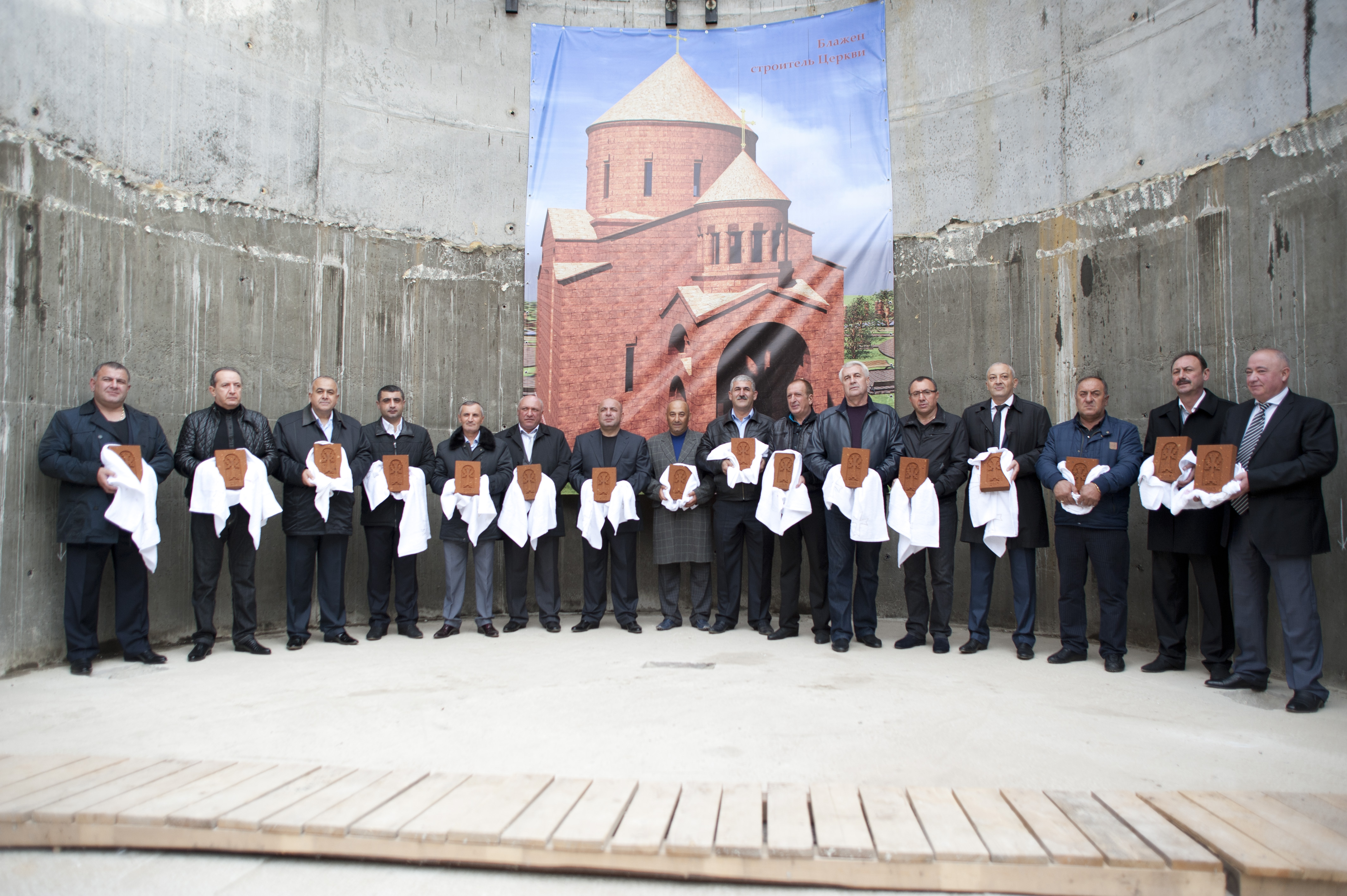 16 меценатов-хачкаворов